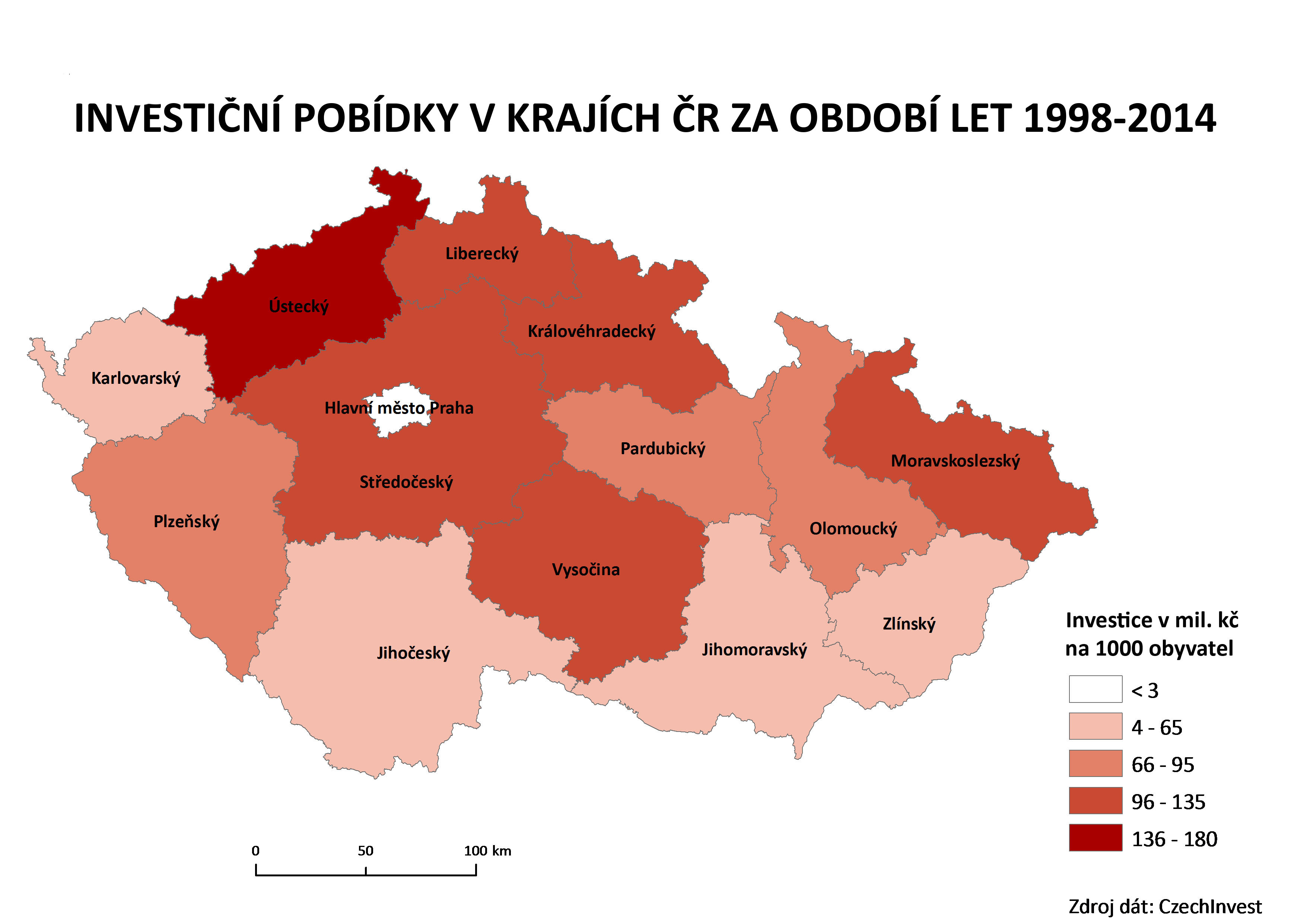 Mapa investičných pobídek na 1000 obyvatel v milionech korun v krajích Česka